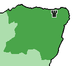 Localisation du château de Delgatie dans l'Aberdeenshire